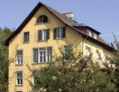 Hauptibliothek UZH HBZ